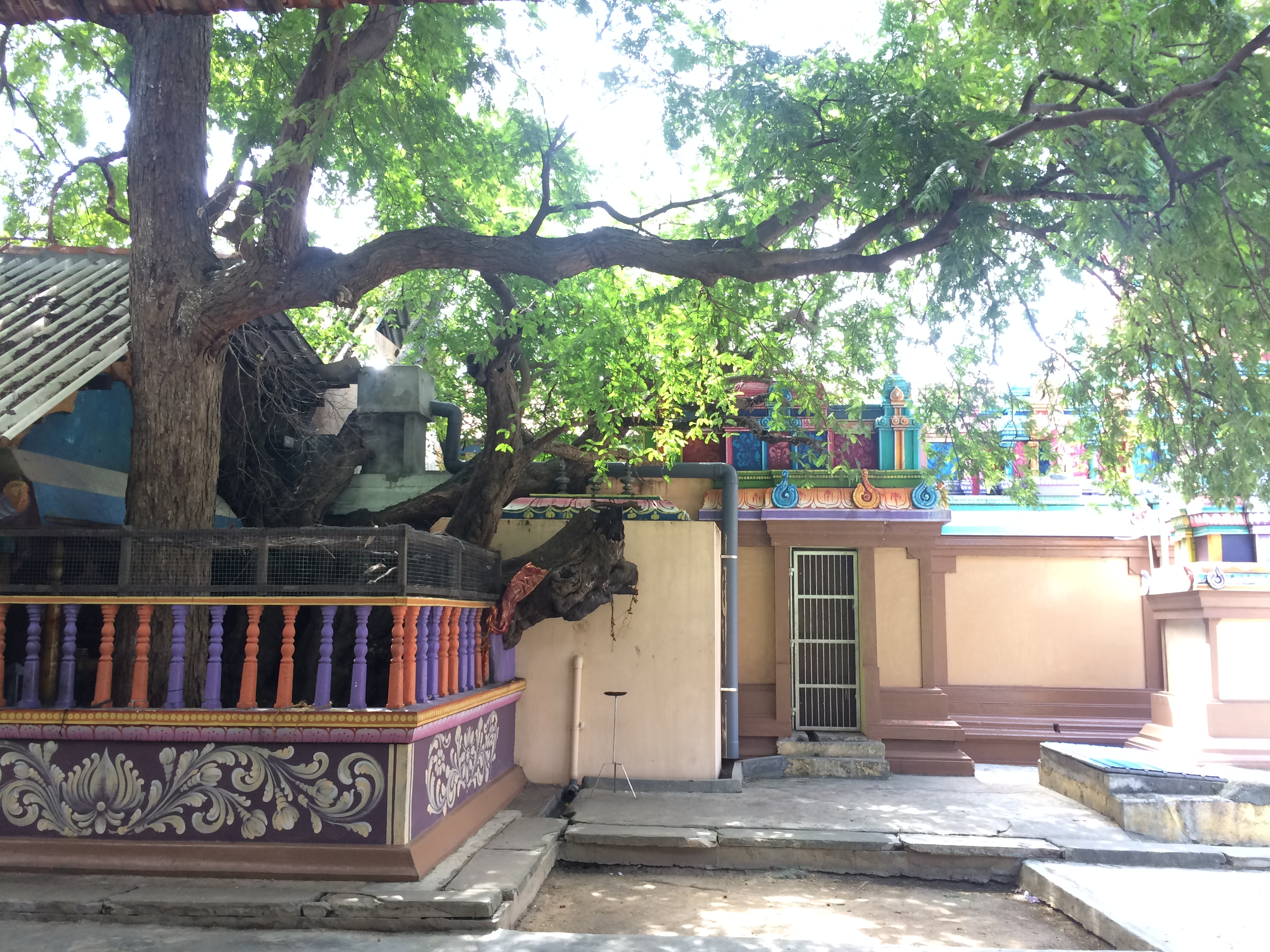 பத்திரகாளி சமேத வீரபத்திரர் கோயில்